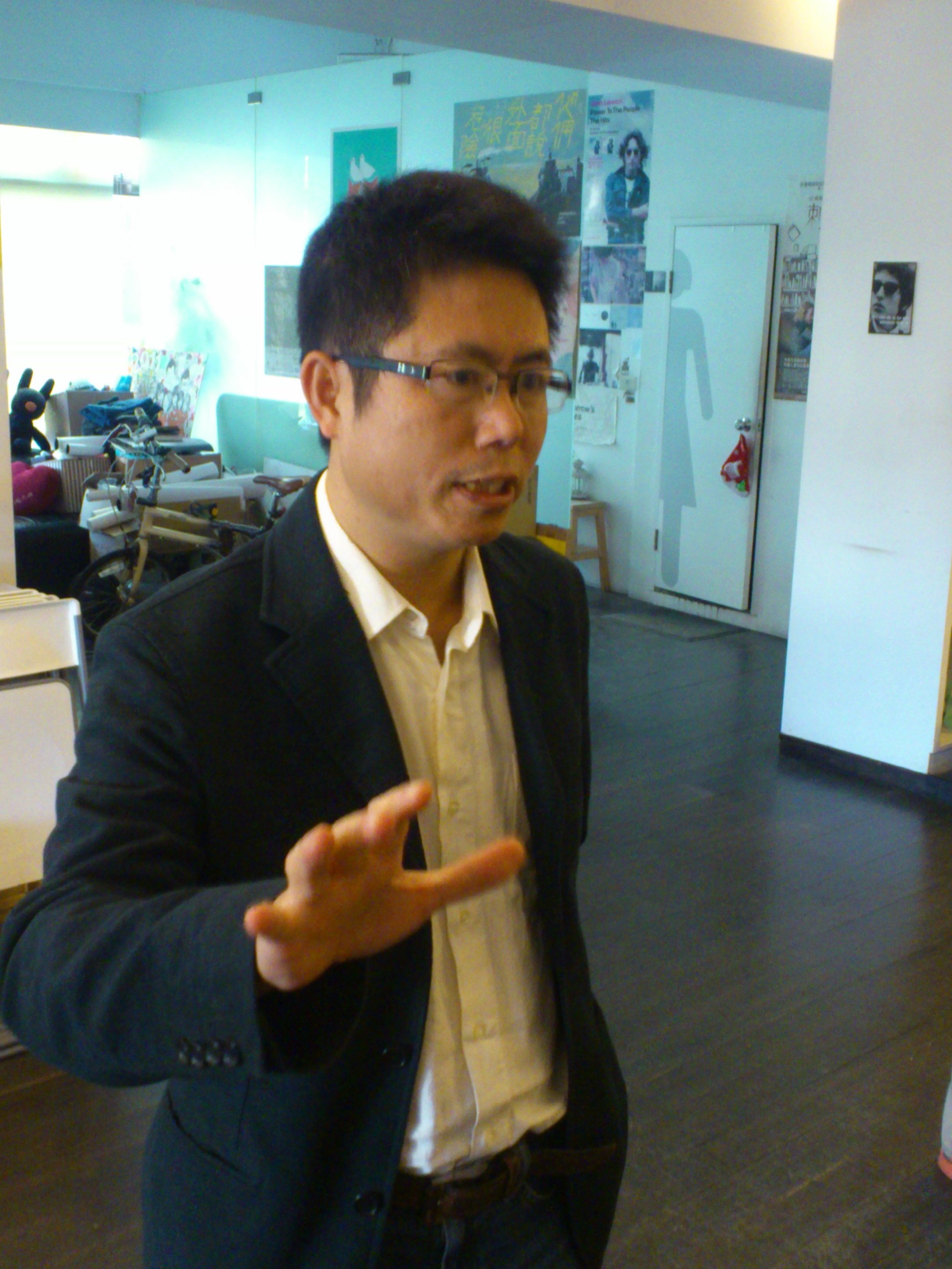 2014年10月19日，臺灣綠黨共同召集人李根政於臺南市。